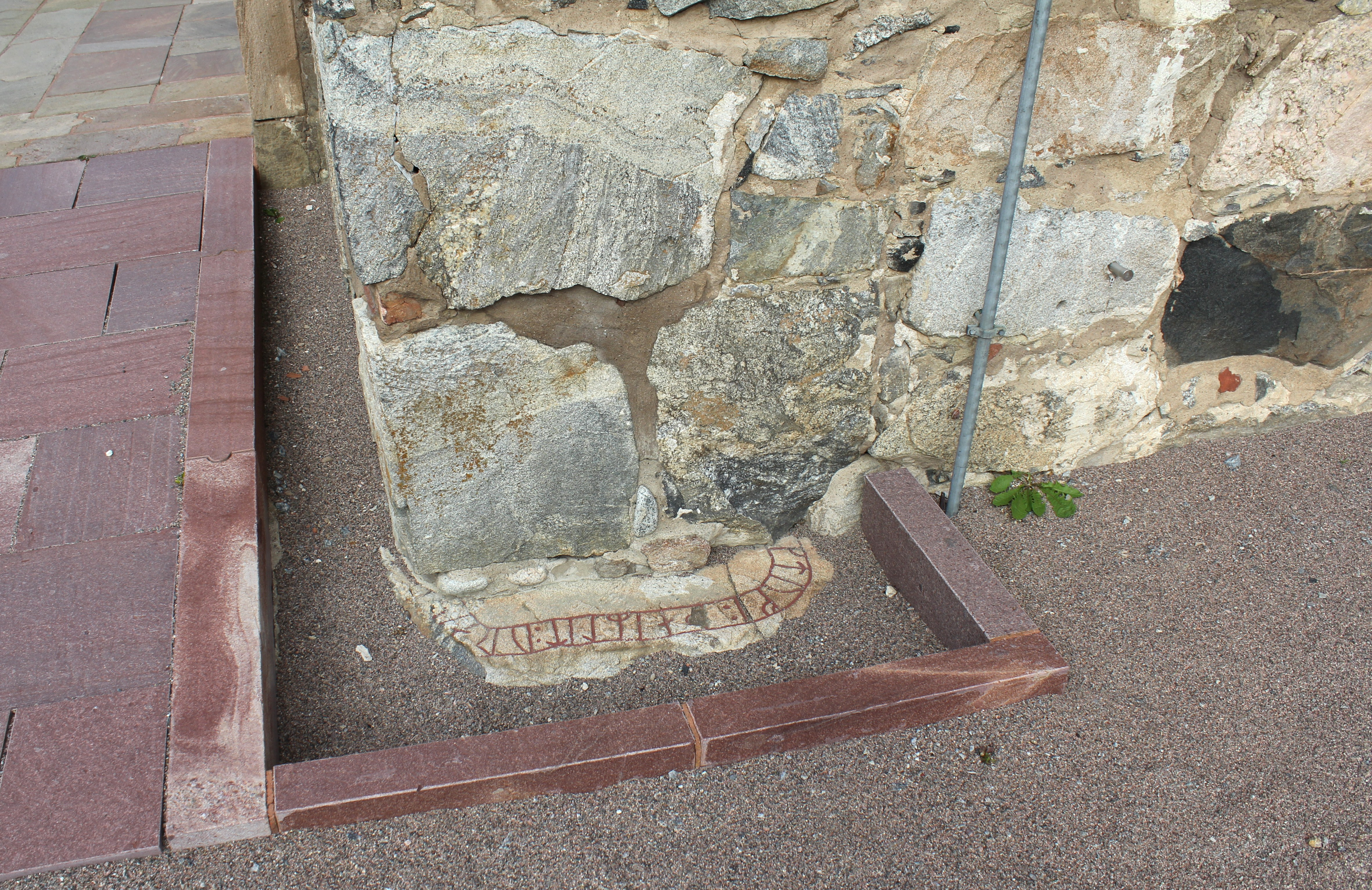 Runstenen Sö 283 under tornet på Botkyrka kyrka.